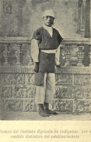 Uniforme del Instituto Agrícola de Indígenas en 1896.